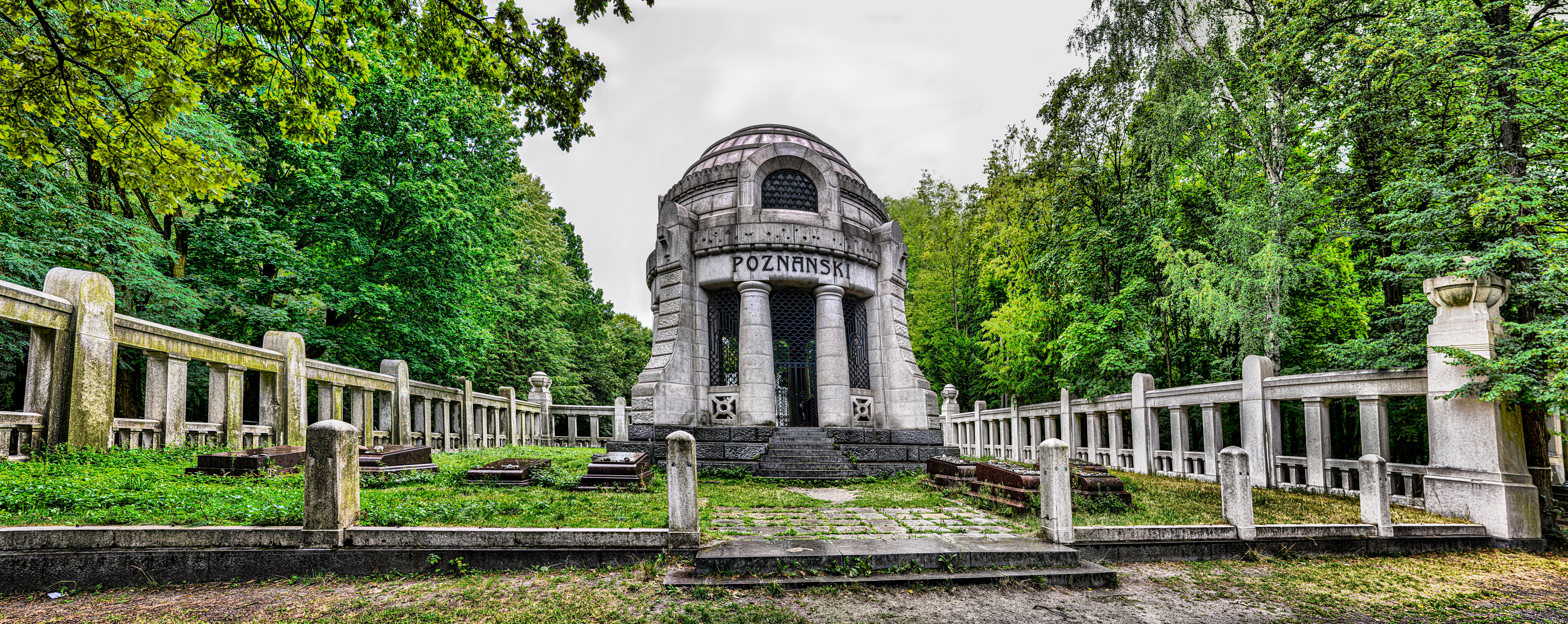 Bałuty-Doły, Nowy cmentarz żydowski w Łodzi